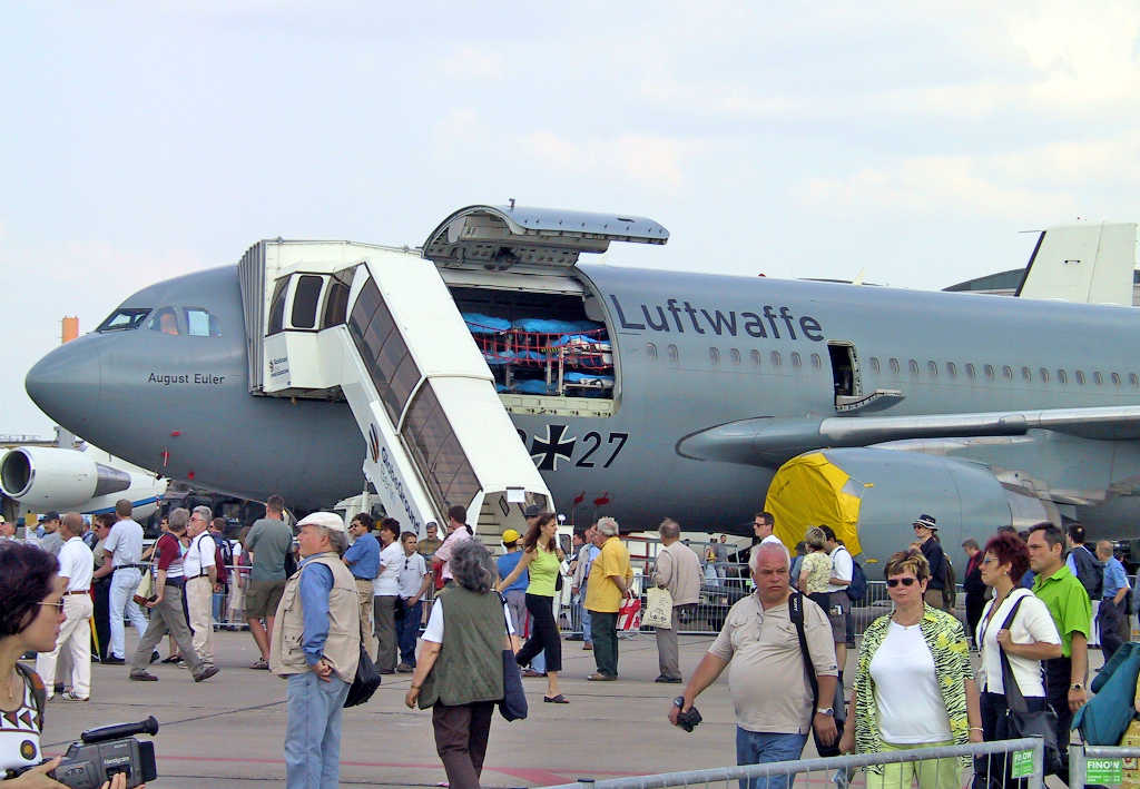 Airbus A310 MRT MedEvac der deutschen Luftwaffe auf der ILA 2002.